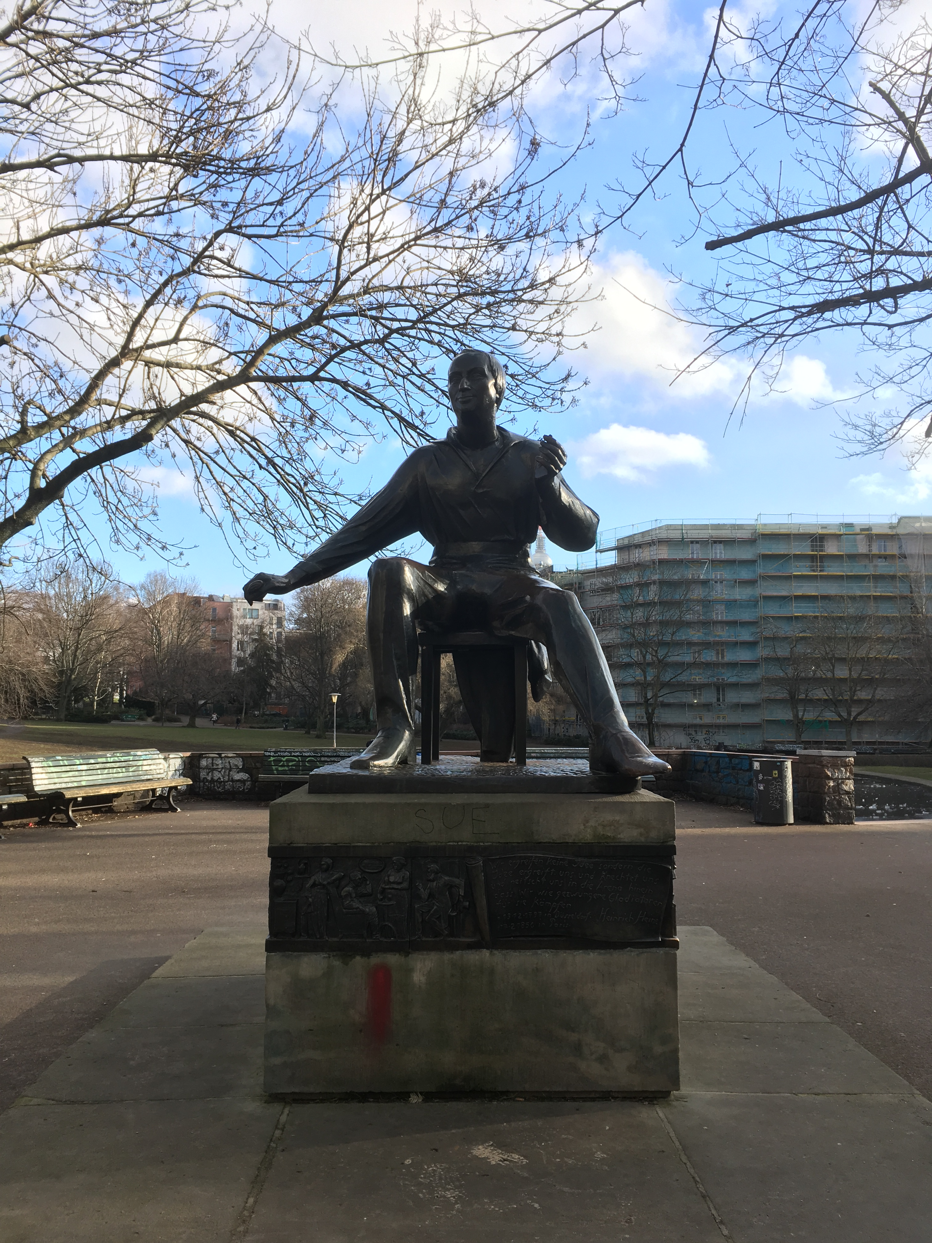 Denkmal von Heinrich Heine am Eingang des Weinbergspark Berlin